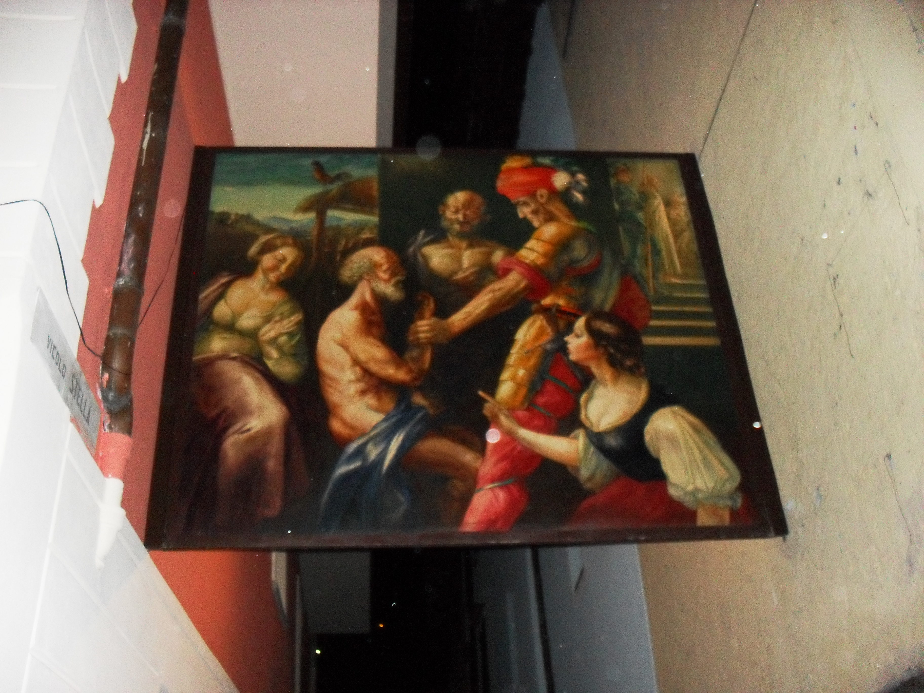 Trasparente nelle strade di Mendrisio